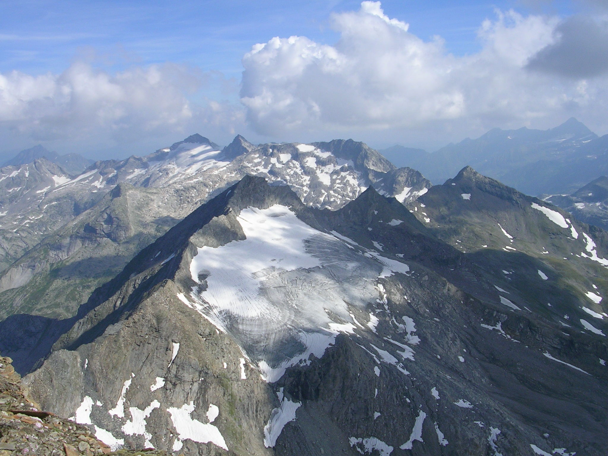 Luckenkogel und Äußerer Knappentröger vom Muntanitz gesehen. Im Vordergrund der Graue Schimme, dahinter der Südostgrat zum Luckenkogel, rechts daneben das Felshorn des Äußeren Knappentrögers. Im Hintergrund Stubacher Sonnblick und Granatspitze